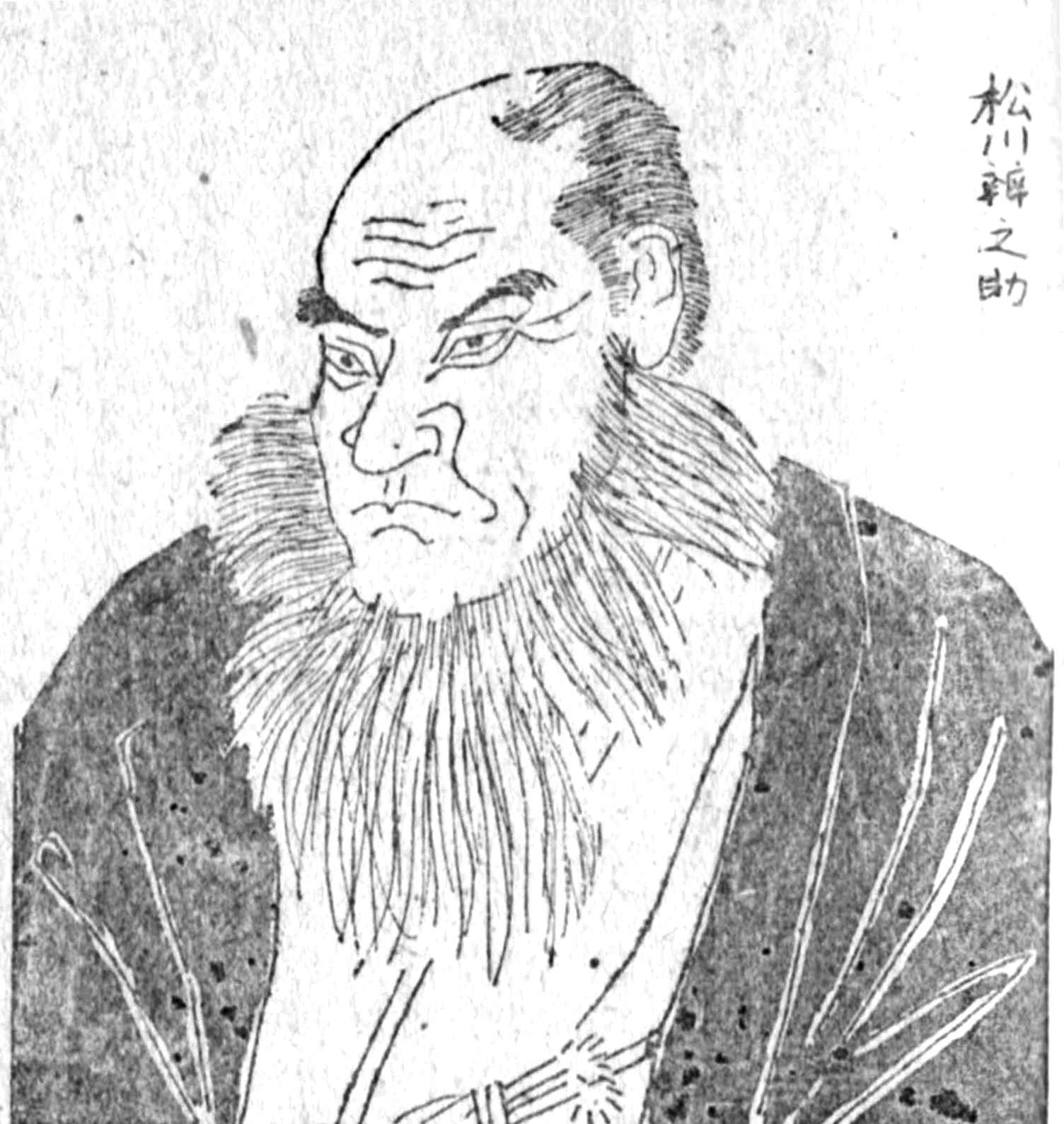 昭和22年刊『北の先覚』（北日本社）に掲載。今田敬一・画